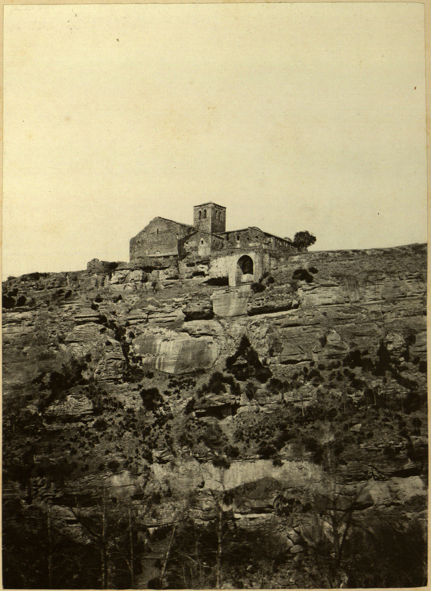 'Sant Pere de Casserres', fotografia d'Heribert Mariezcurrena (~1878). Estampa núm. 11, acompanyada de text explicatiu, a l'Album Pintoresch-Monumental de Catalunya: aplech de vistas dels més notables monuments i paisatjes d'aquesta terra acompanyadas de descripcions y noticias históricas y de guias pera que sían fácilment visitats, publicat per l'Associació Catalanista d'Excursions Científiques el 1878. De disposició lliure al dipòsit digital de documents de la UAB.